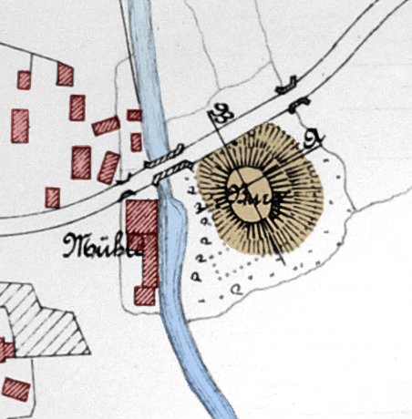 Burg Wahrenholz an der Ise neben einer Wassermühle, nachträglich eingefärbt